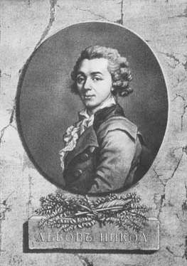 Портрет Николая Александровича Львова. Гравюра А. Тардье (1756-1844) по оригиналу работы Д. Г. Левицкого